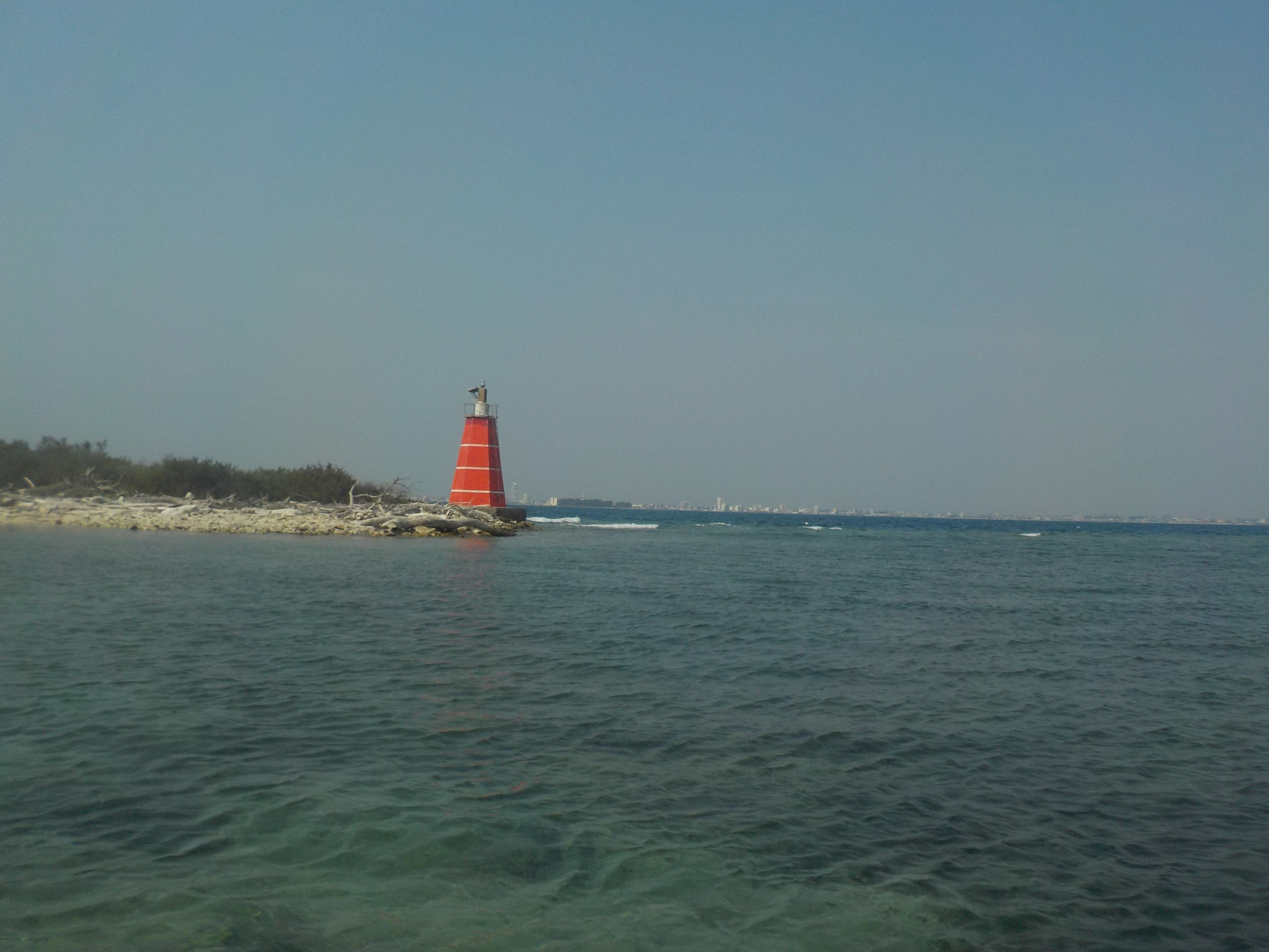 Faro en isla verde, Veracruz